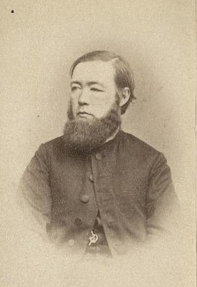 Eestimaa vaimulik Engelbrecht Karl Konstantin von Tiesenhausen